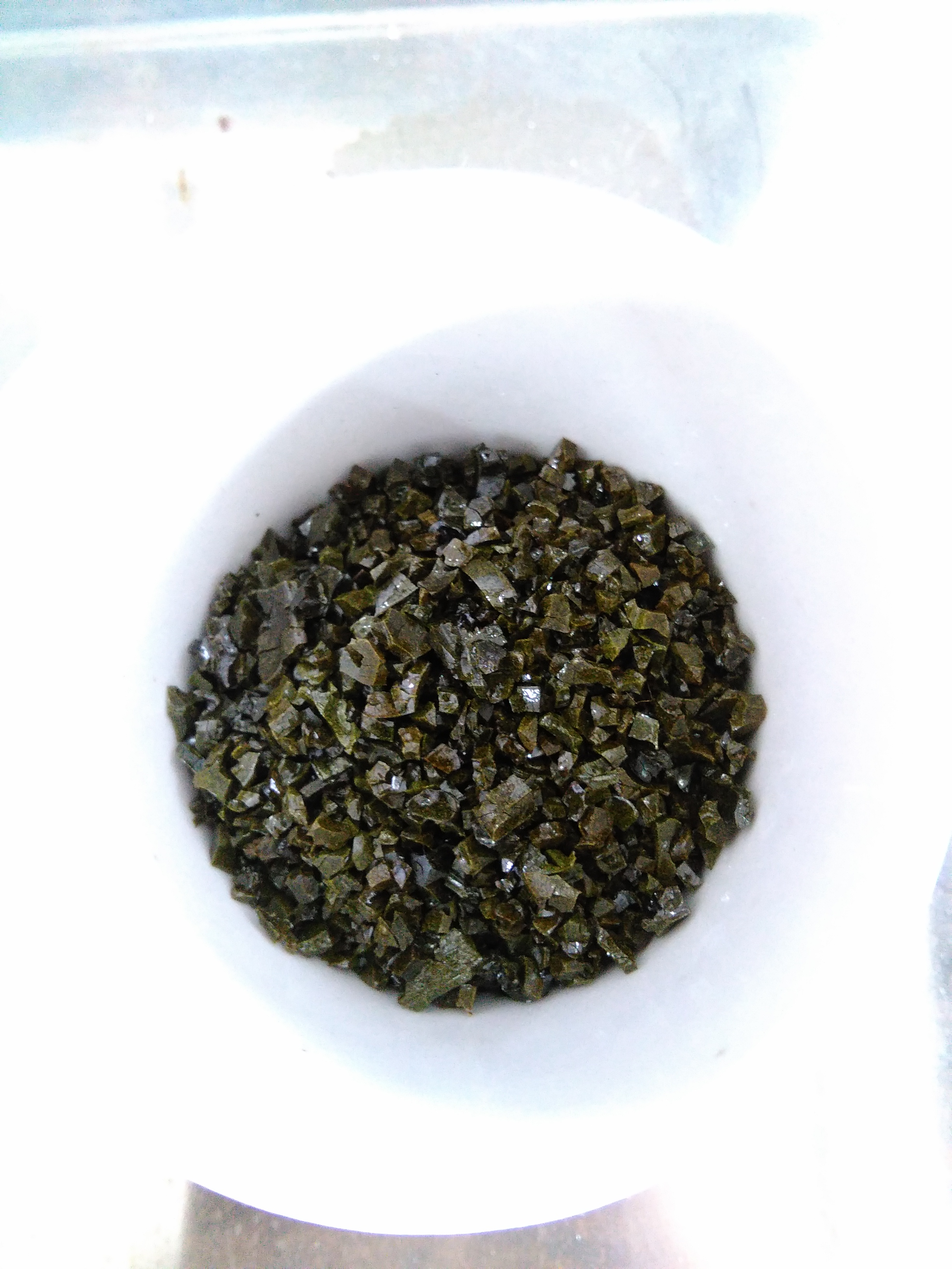 通过溶胶-凝胶法制备的镍基催化剂 NiO/TiO2-SiO2，NiO含量计算值34.9%.